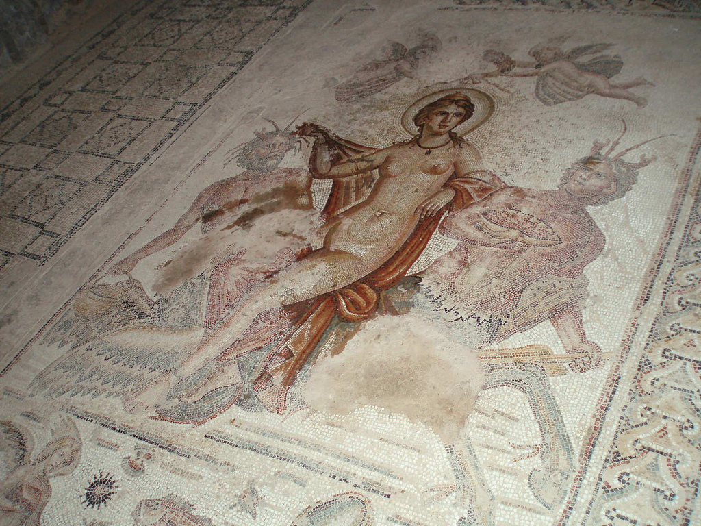 Mosaïque de Bulla Regia. Venus Marine.